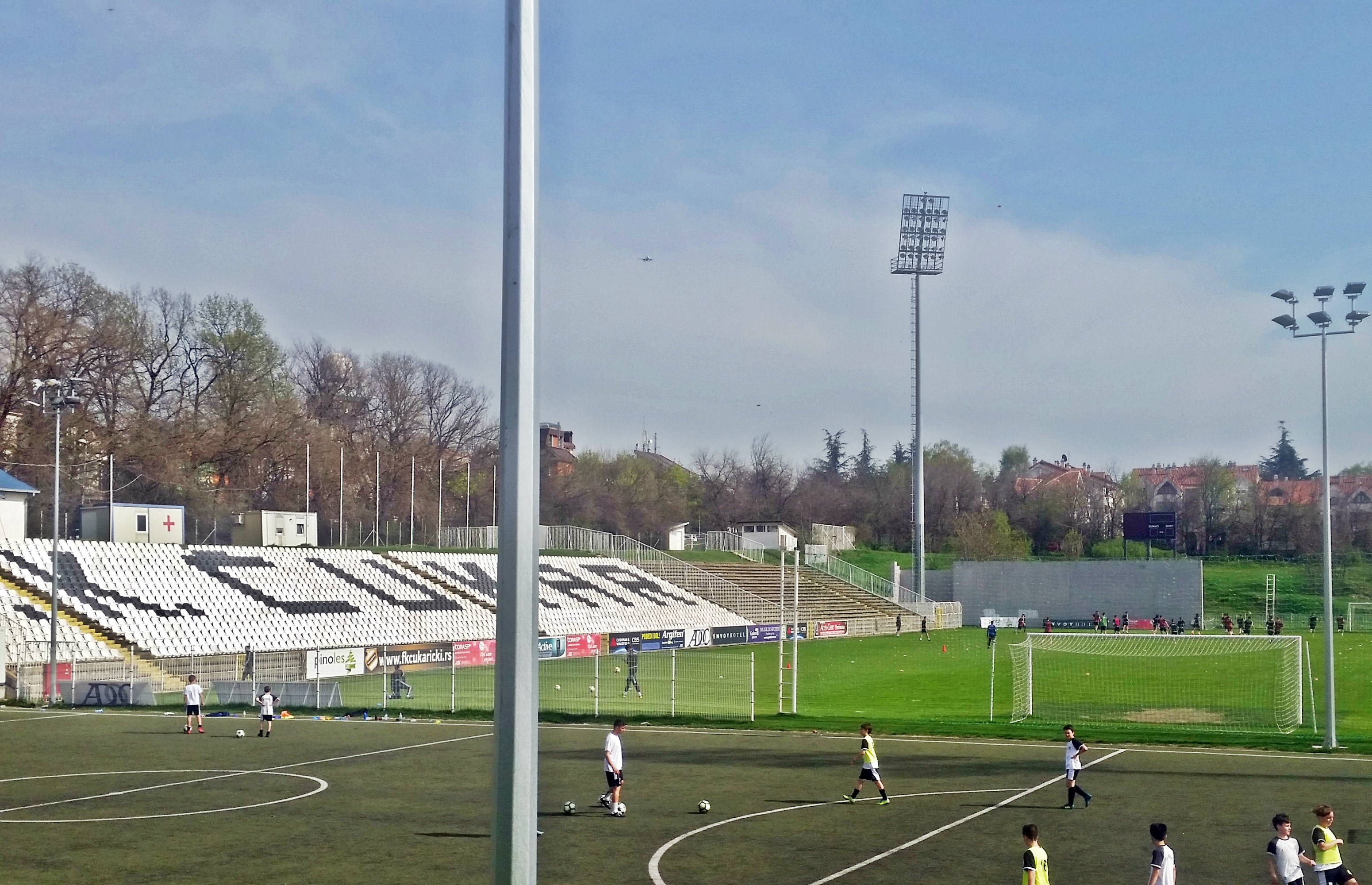 Tribuna Est